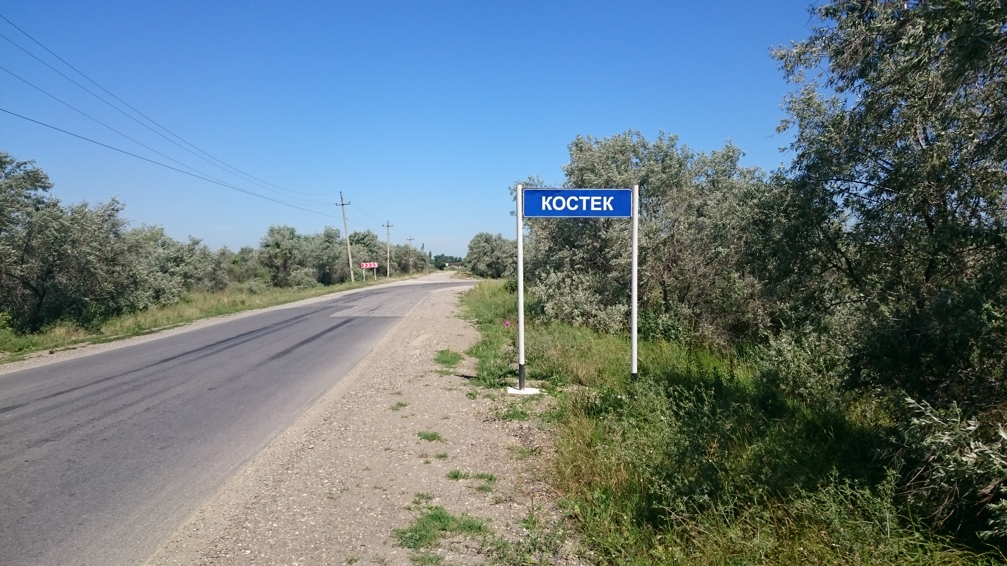 Въезд в с.Костек